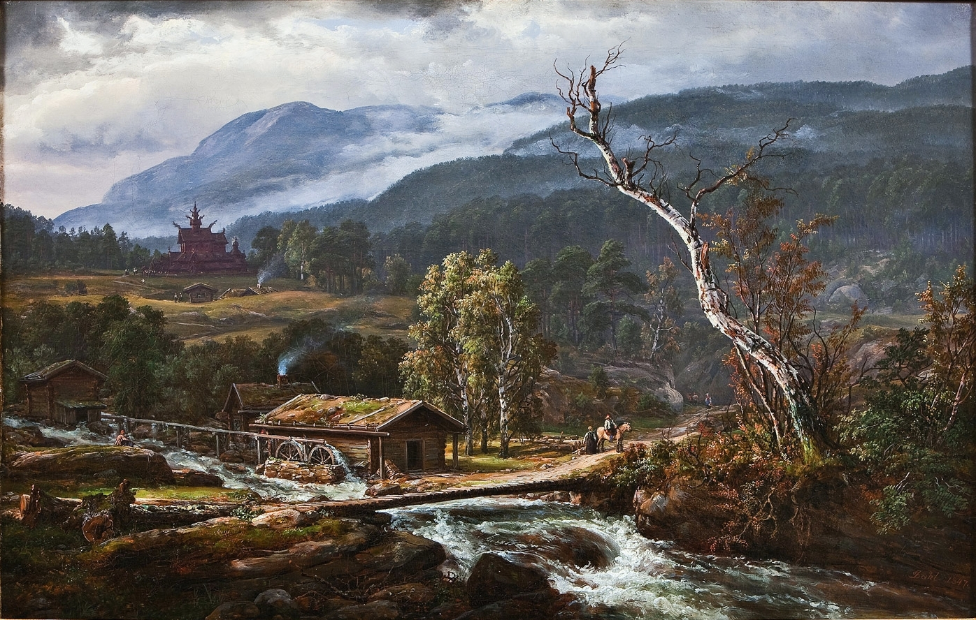 Nach Tagebucheinträgen Dahls aus dem Jahr 1847 wurde das Gemälde "Landschaft bei Kaupanger mit Stabkirche" bei ihm von dem Sammler Hans Konow aus Christiania bestellt, wobei Dahl hervorhebt, dass das Charakteristische der Region und ihrer Vegetation von ihm genau beobachtet wurde. Da sich die vormals berühmte mittelalterliche Stabkirche in Kaupanger aber nur baulich verändert erhalten hatte, wurde sie in der Darstellung des Gemäldes von Dahl durch die Ansicht der Stabkirche aus dem norwegischen Ort Vang ersetzt. Diese Kirche in Vang sollte um 1840 einem Neubau weichen und abgerissen werden, auf Betreiben Dahls wurde sie aber 1841 vom preußischen König Friedrich Wilhelm IV. erworben, abgebaut, in Einzelteile zerlegt und im schlesischen Riesengebirge im Ort Krummhübel wiederaufgebaut.[1] ↑ Auktionshaus Lempertz 2010